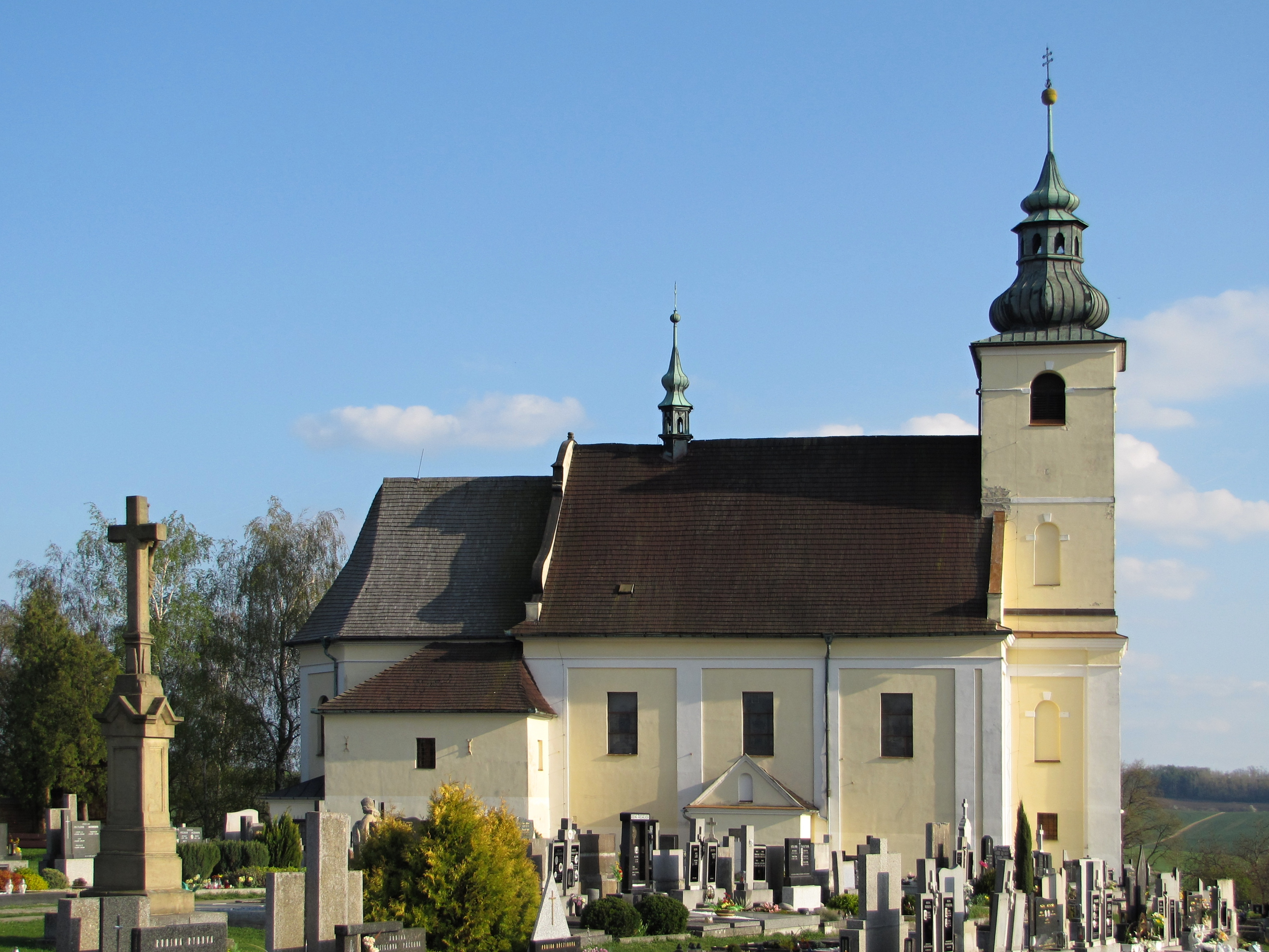 Kostel svatého Jakuba Většího v Ježově, okres Hodonín